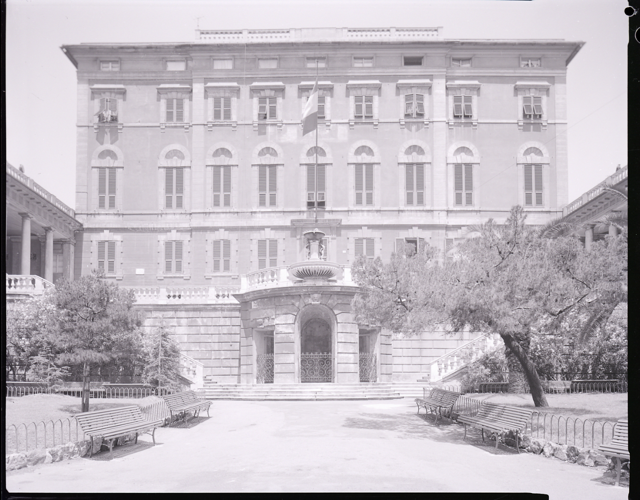 Genova-Cornigliano. Villa Serra, ora del Comune, 1787. Facciata. Servizio fotografico : Genova, 1963 / Paolo Monti. - Buste: 9, Fototipi: 9 : Negativo b/n, gelatina bromuro d'argento/ pellicola ; 10x12. - ((Serie costituita da 9 buste sciolte di negativi identificati con i nn.: 6550, 6551, 6552, 6553, 6554, 6555, 6556, 6556bis (copia del n. 6556), 6557. - Il negativo identificato con il numero 46397 è stato realizzato per Zodiac. - Occasione: Documentazione per la pubblicazione: Italia Nostra (a cura di), "Le ville genovesi", catalogo della mostra, Genova 1962, Genova, Comune di Genova, 1967. - Fonte: Monografia di Italia Nostra (a cura di): Le ville genovesi, catalogo della mostra, Genova 1962, Genova, Comune di Genova (1967). - Fonte: Lettera di Paolo Monti: I. Carteggi/ Genova - Enrico (1963-1966), presso Archivio Paolo Monti. Camicia con documenti dattiloscritti e manoscritti vari relativi al lavoro eseguito per Italia Nostra: preventivi, lettere, inventari. - Fonte: Rubrica di Paolo Monti: Archivio fino 1-4-1961/ 31-3-1963 (1961-1963), presso Archivio Paolo Monti. - Fonte: Agenda di Paolo Monti: R 1 - Monti/ 1 aprile 1963 - 6 giugno 1964/ 6000-8193 (1963-1964), presso Archivio Paolo Monti